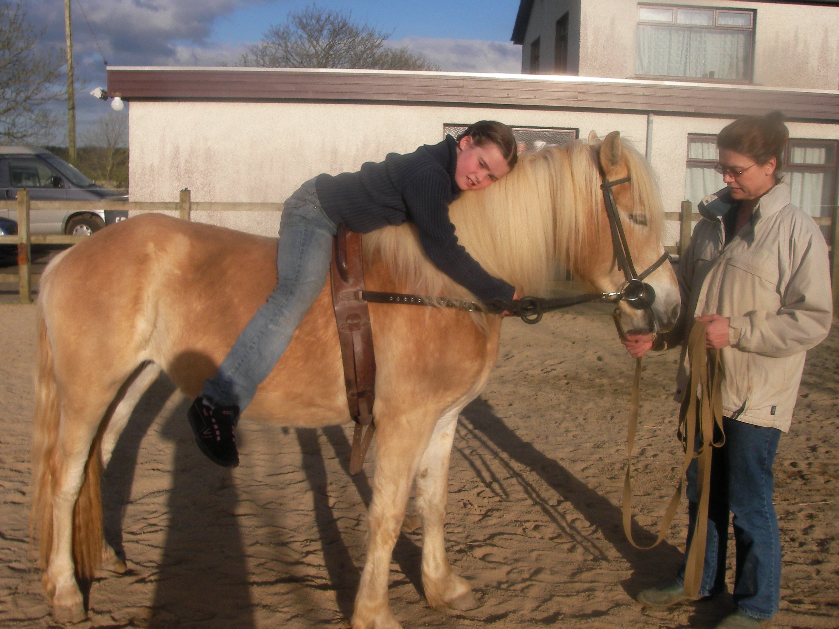 Therapeutisches Reiten, Kind auf Pferdehals